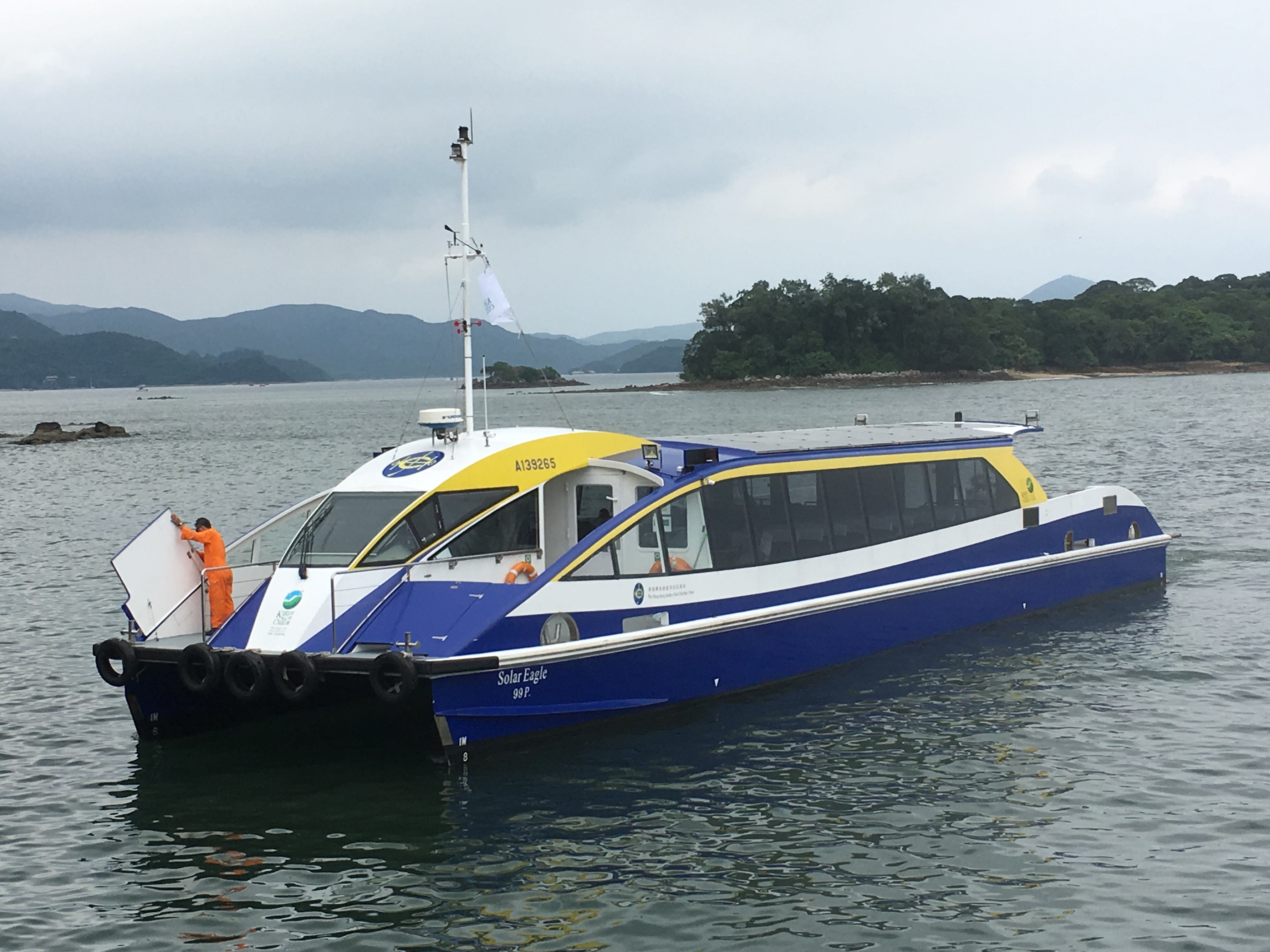 This photo is taken in Sai Kung.